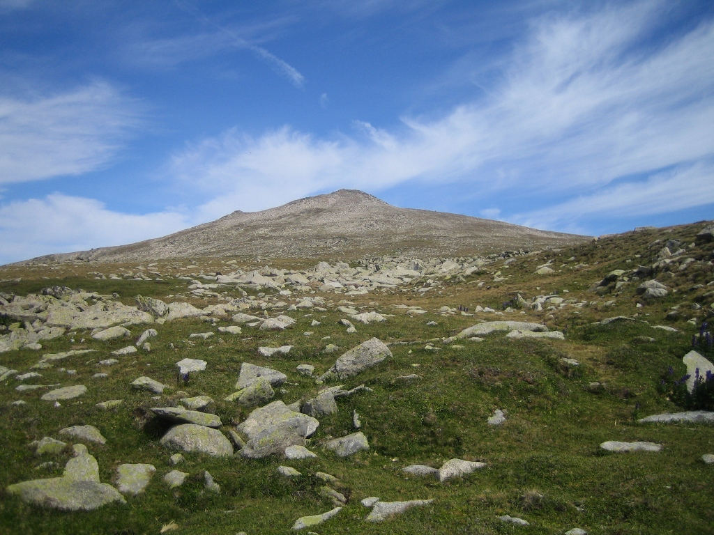 Cim del Puigpedrós (Cerdanya)